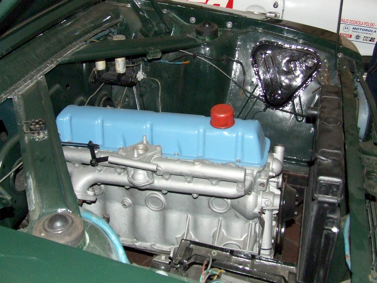 Warszawa 210 - engine